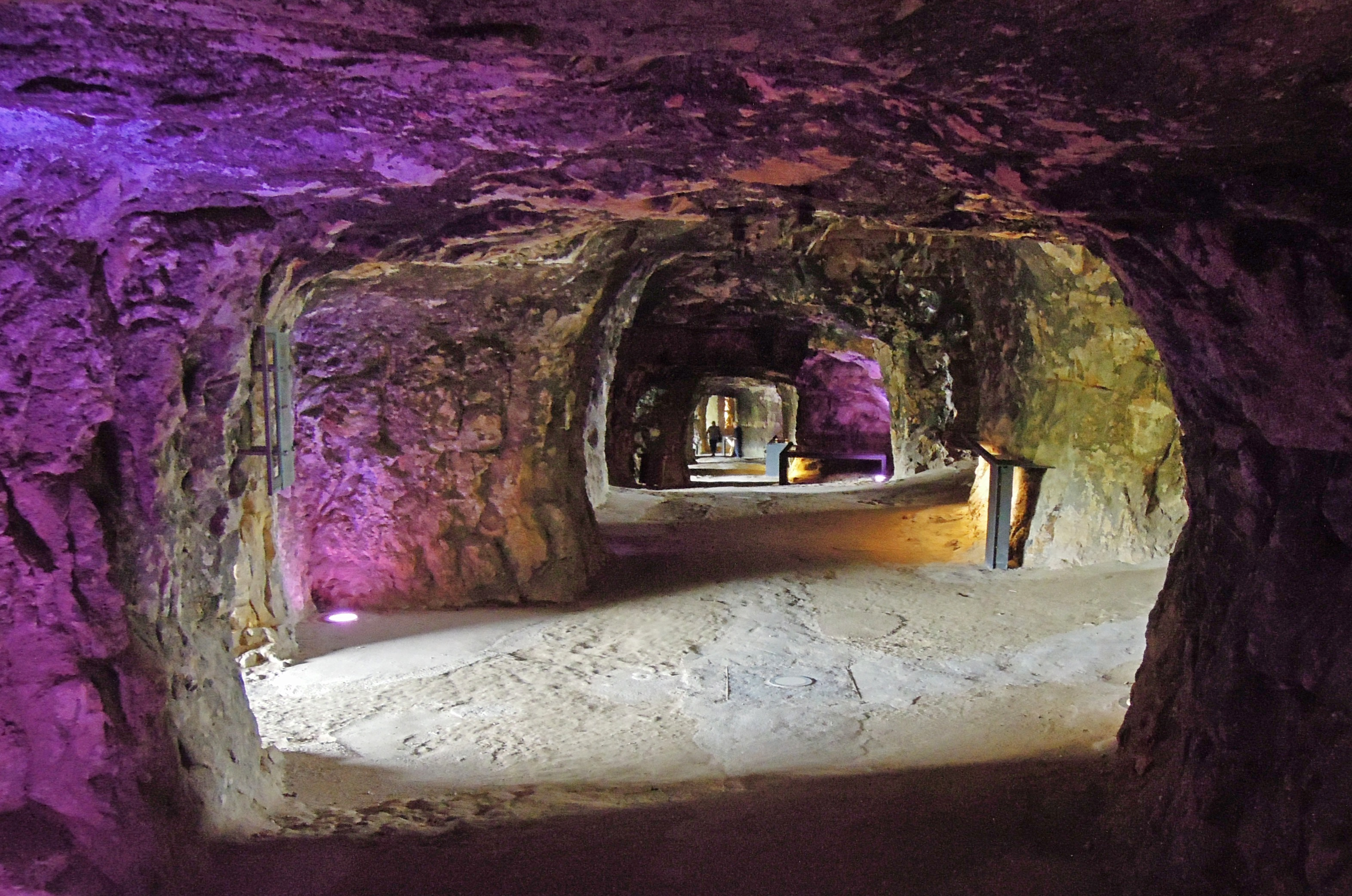 Gang in den Kasematten von Luxemburg